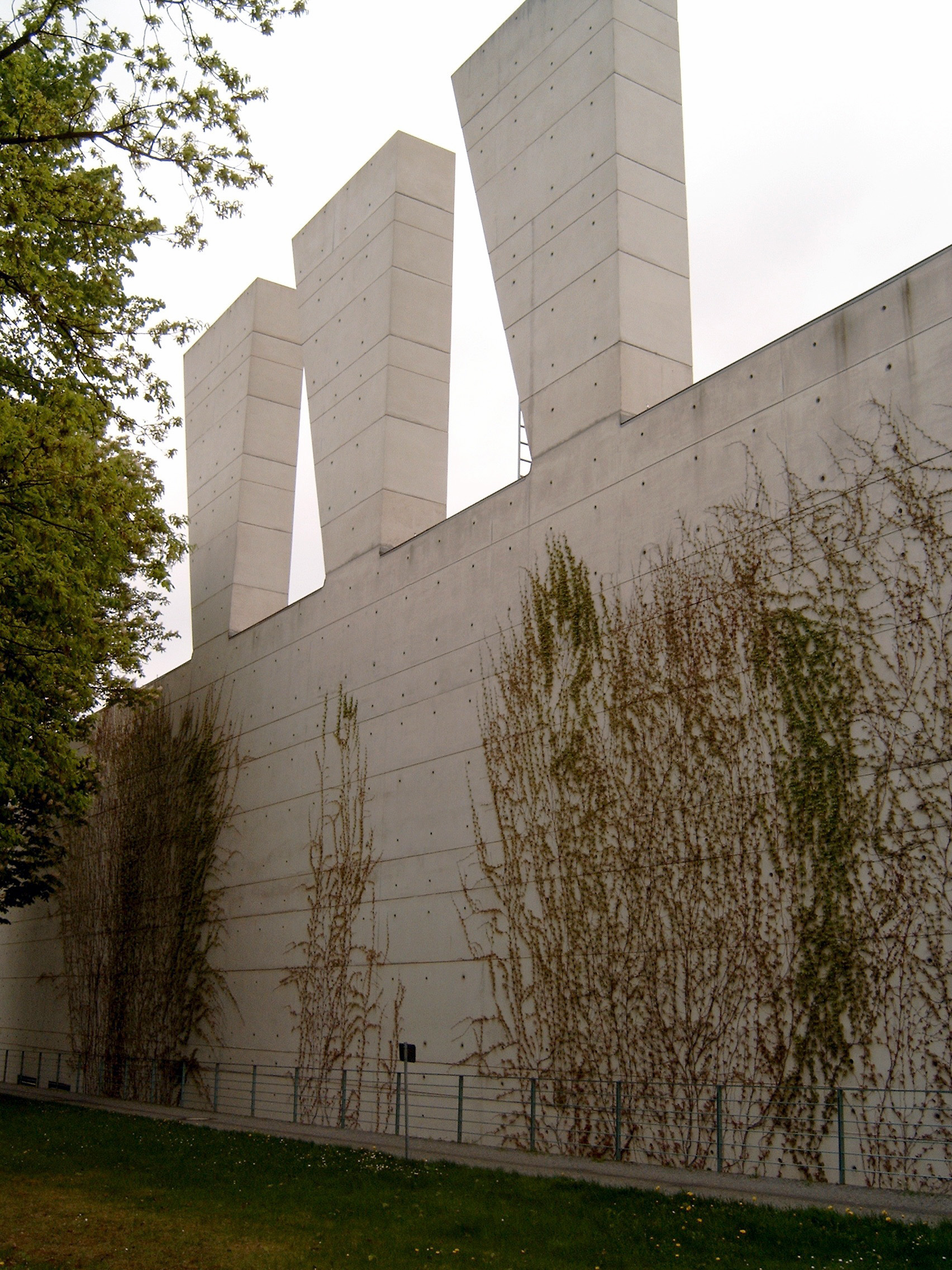 Kamine des Krematorium Berlin-Baumschulenweg